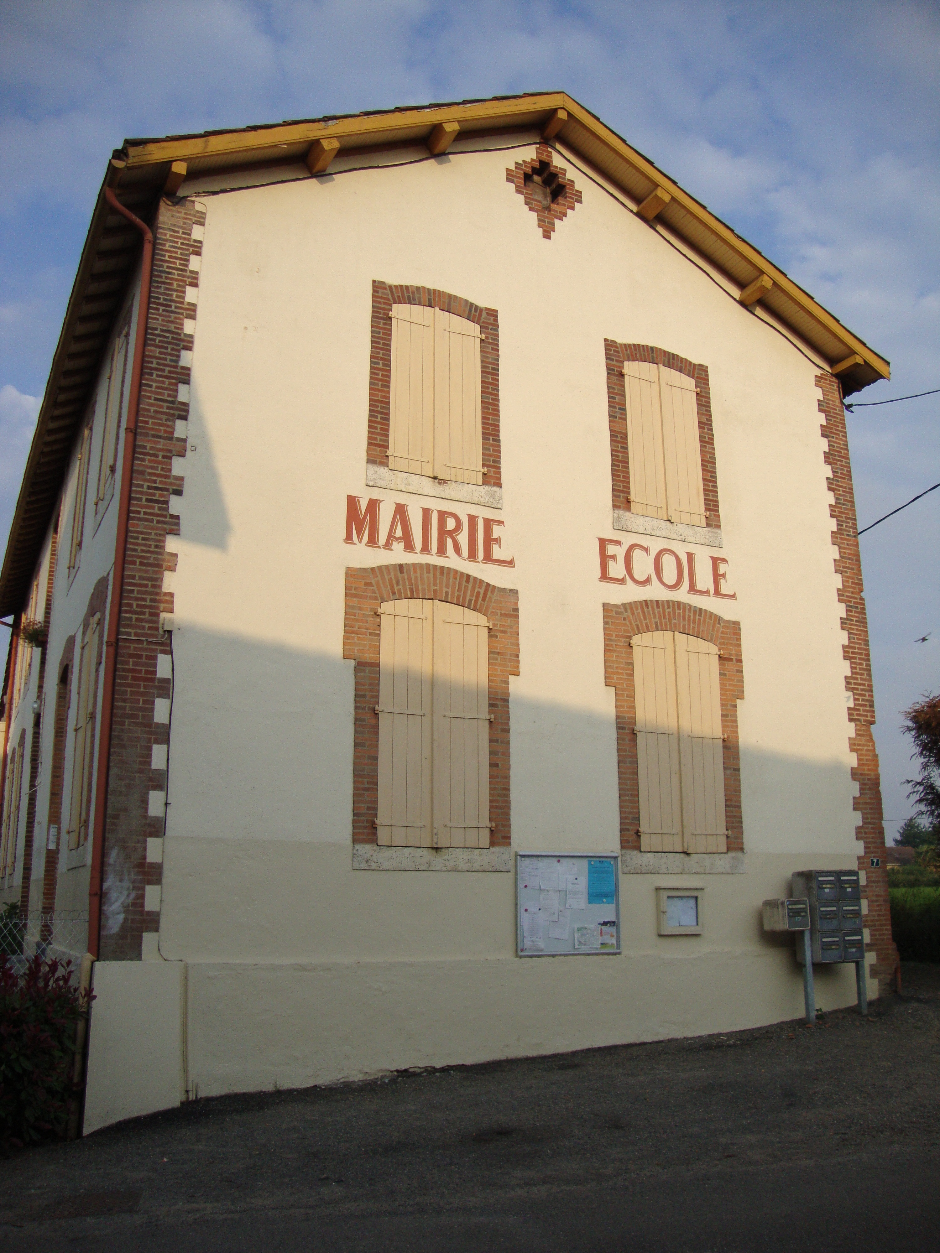 Lahitte-Toupière (Hautes-Pyr, Fr) mairie-école